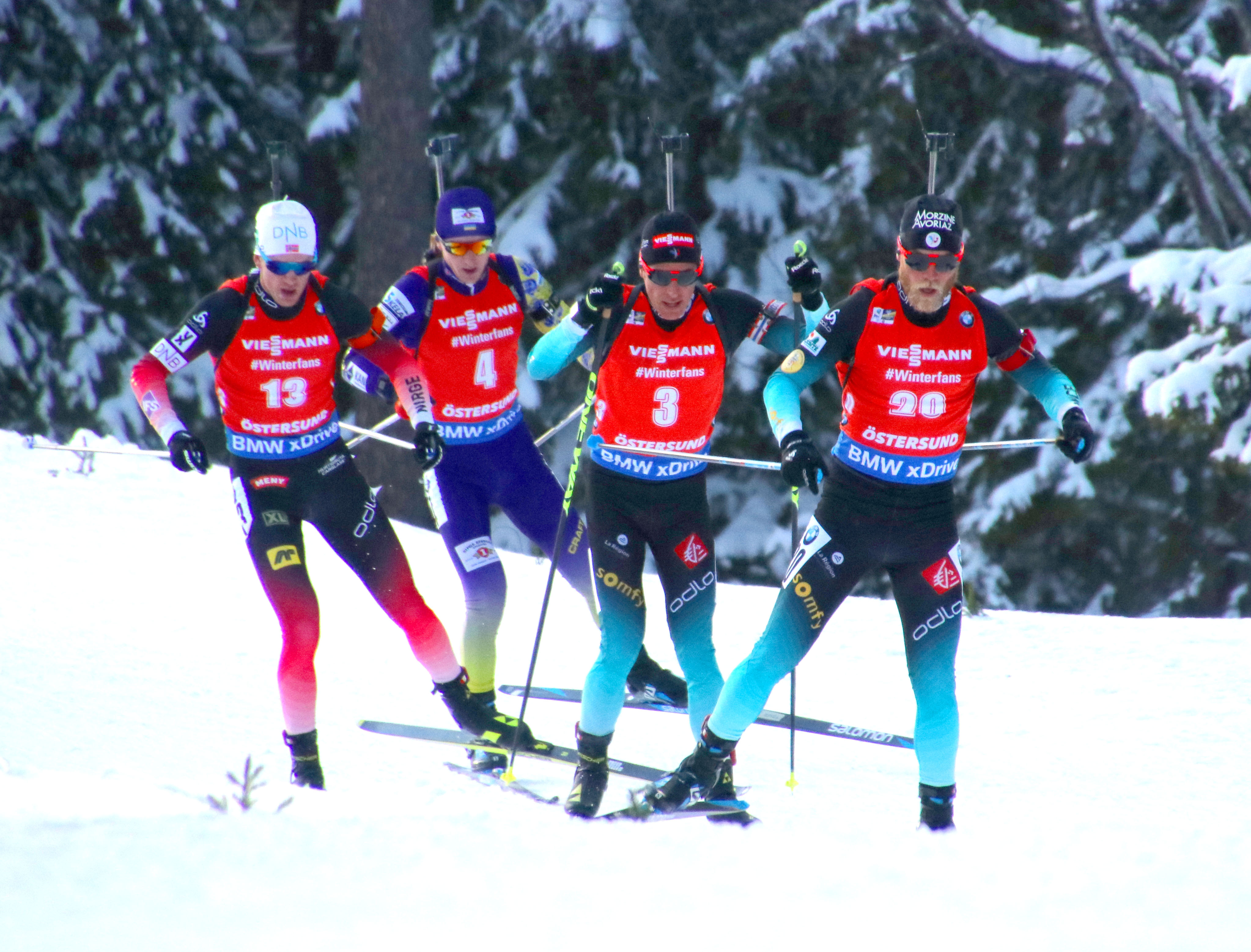 Östersund. Antonin Guigonnat, Quentin Fillon-Maillet, Tarjei Boe och Dmytro Pidruchnyi på skidskytte-VM.